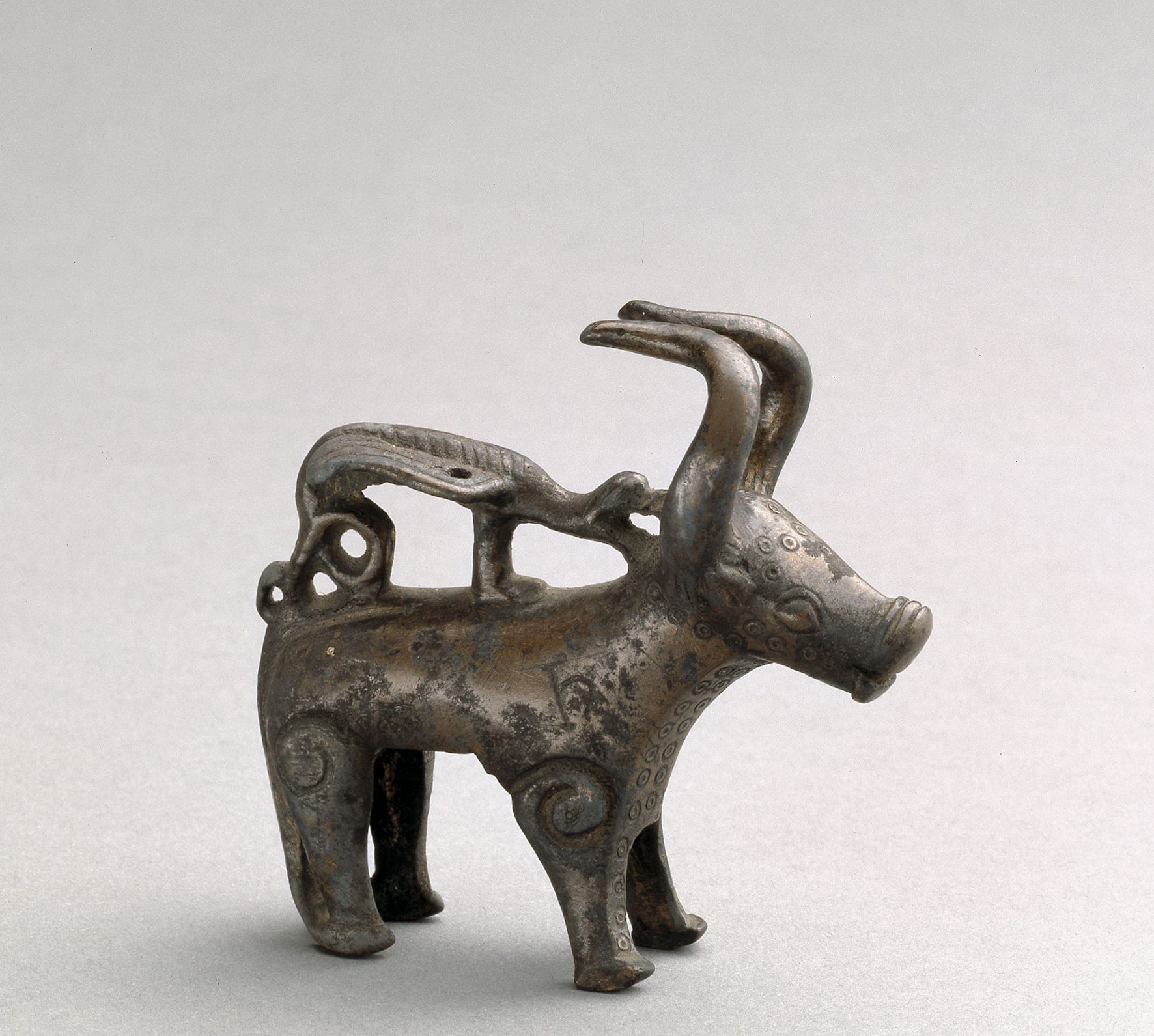 Okseformet vægtlod af bronze. Der er i Danmark, Norge og Sverige - med overvægt i Oslo-området - fundet mange vægtlodder i form af heste med og uden sadel samt okser med og uden en drage på ryggen. Flere har indstemplet et "h" (det gælder blandt andet oksen fra Fyn) eller et "o", antagelig for den norske kong Håkon 6. (1355-80) og hans søn med Margrete (1.), den dansk-norske konge Olav (Oluf), død 1387. Vægtlodderne følger et gammelt norsk vægtsystem med mark, halvmark, kvartmark (to øre) og ottendedelsmark (en øre). Datering: 1370-80.